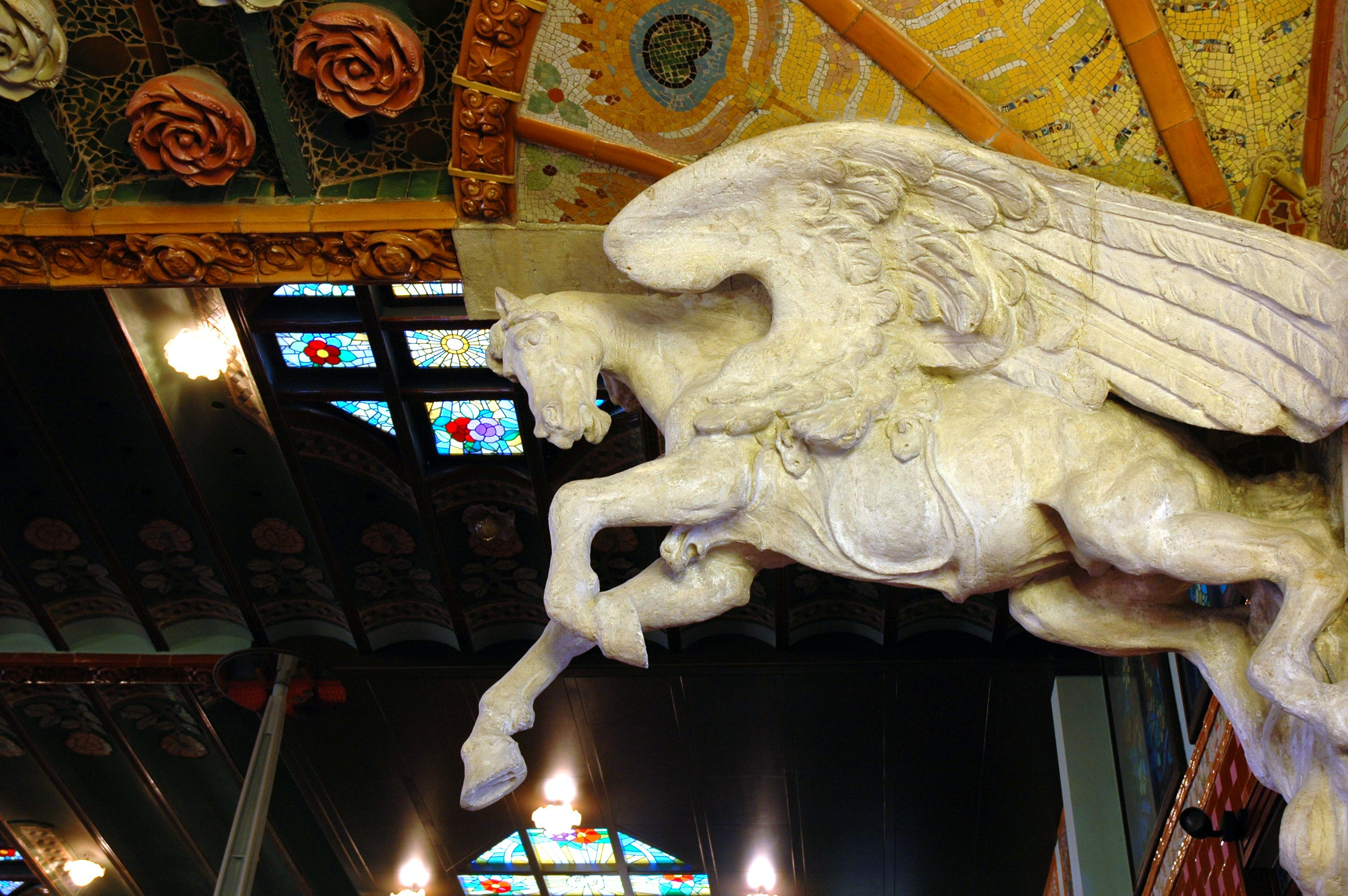 Palau de la Música - Cavall alat